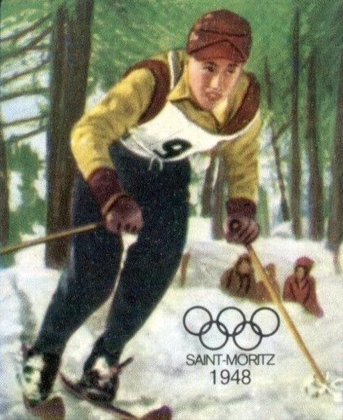 CAMPIONI dello SPORT 1968/69-n.379- OREILLER-FRANCIA-SCI DI FONDO